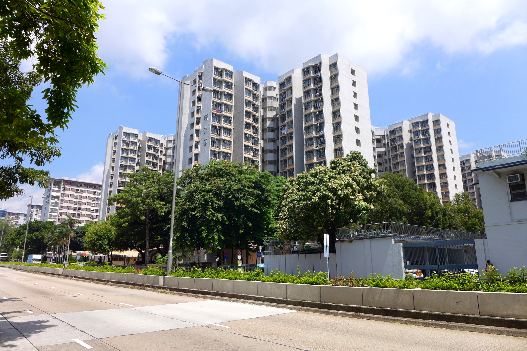 Lai On Estate